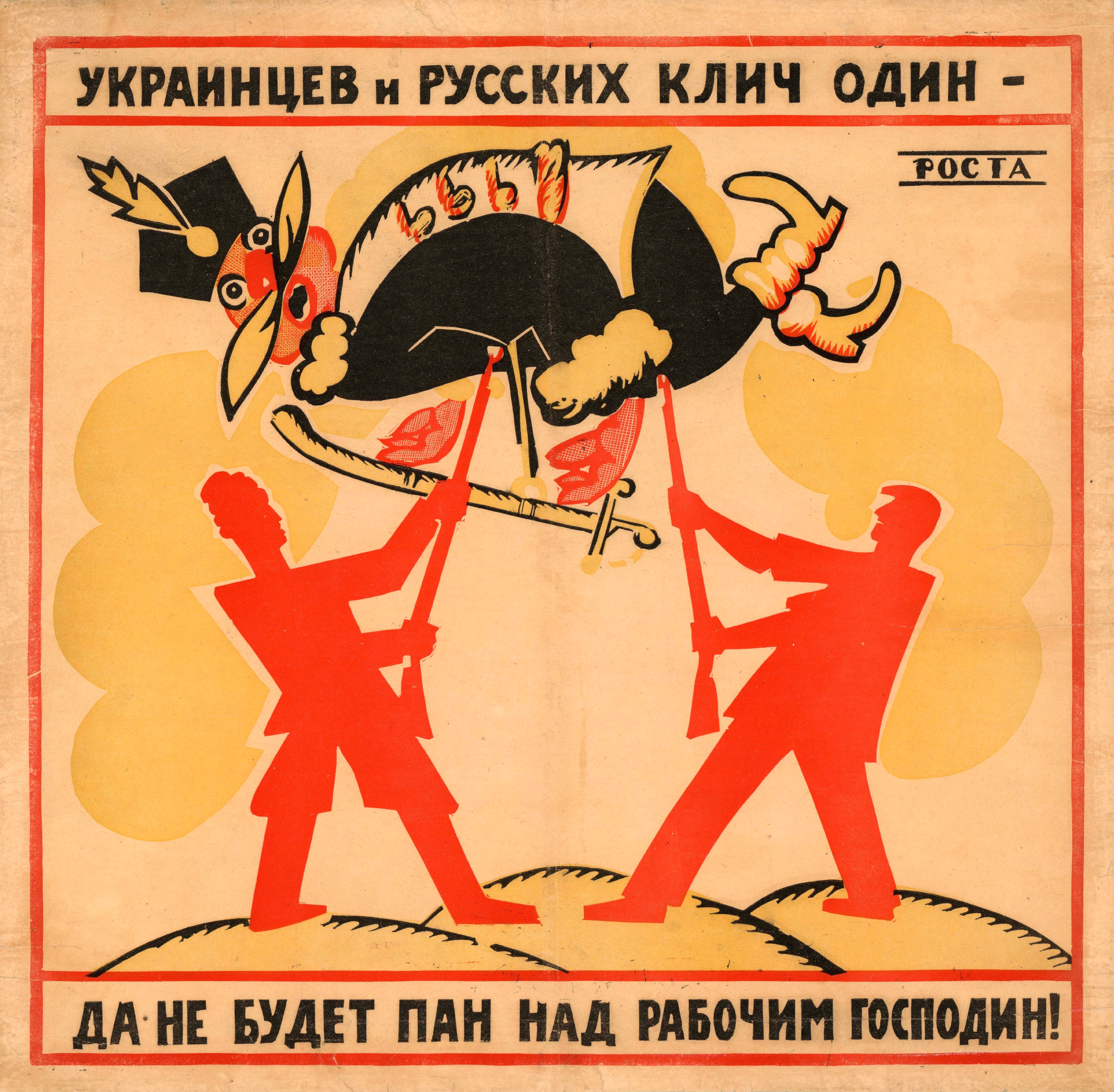 Украинцев и русских клич один — да не будет пан над рабочим господин! : [плакат]. — [Москва] : РОСТА, [1920]. — Цветная литография, 1 лист, 64 × 65 см.